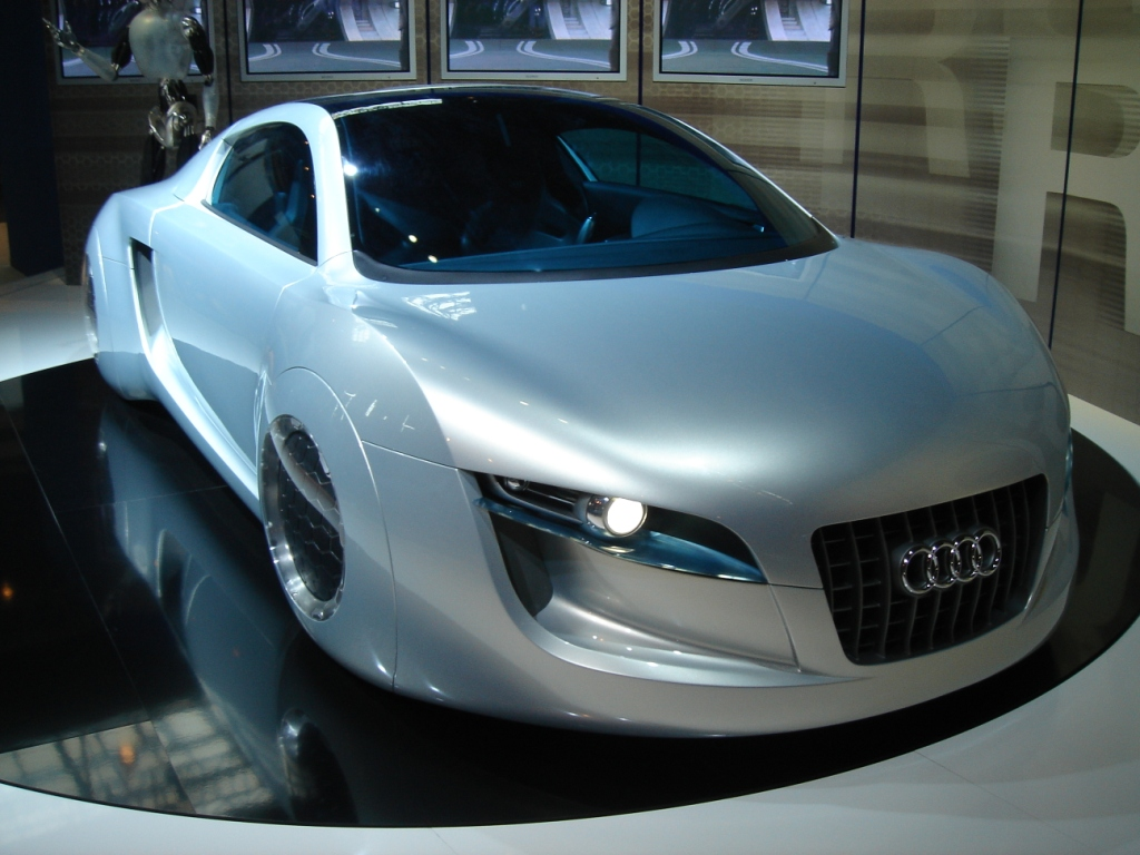 Audi RSQ, film I, Robot; Computer- und Telekommunikationsmesse Cebit 2005, Hannover